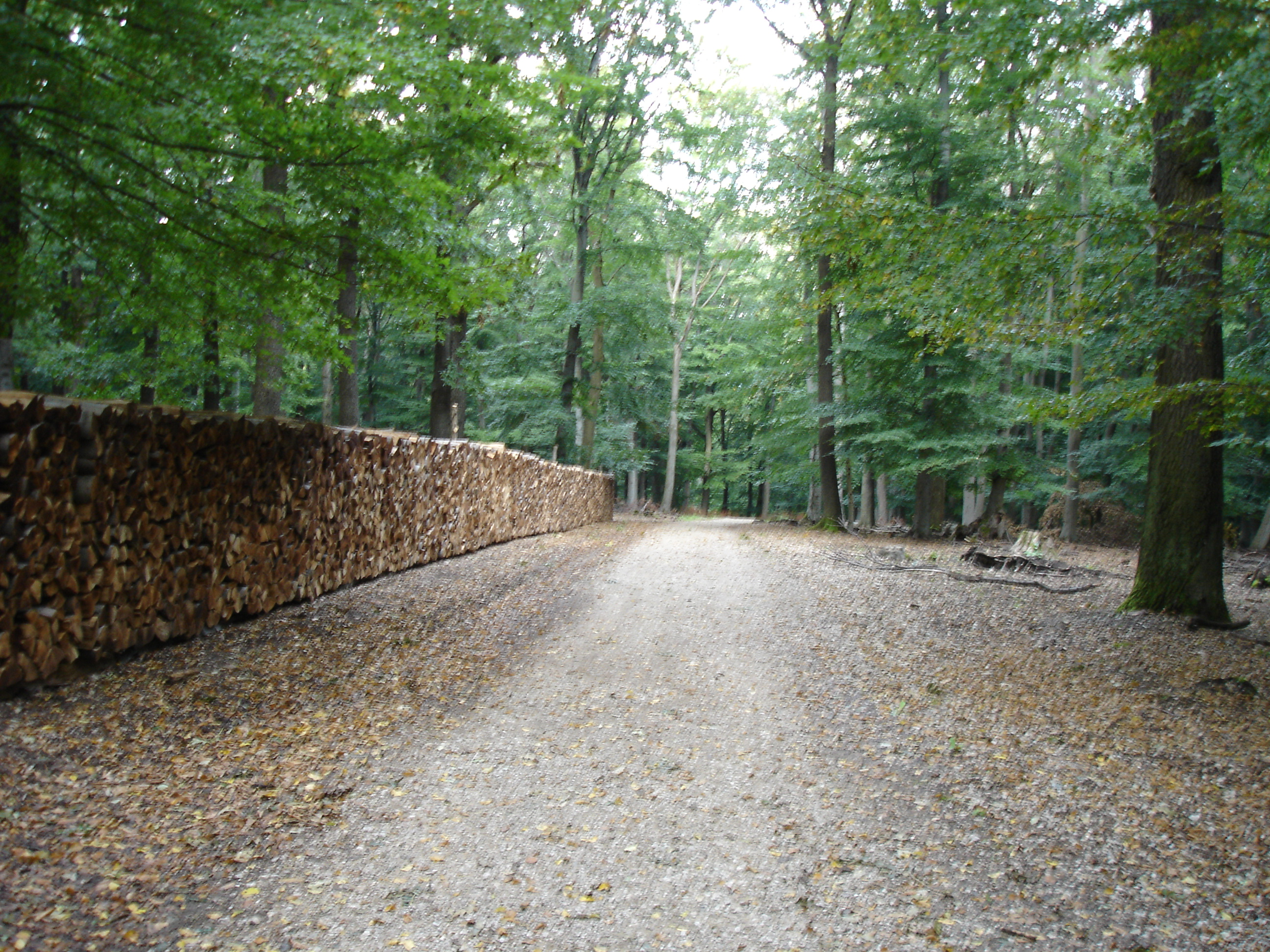 Path in Vienna's Lainzer Tiergarten